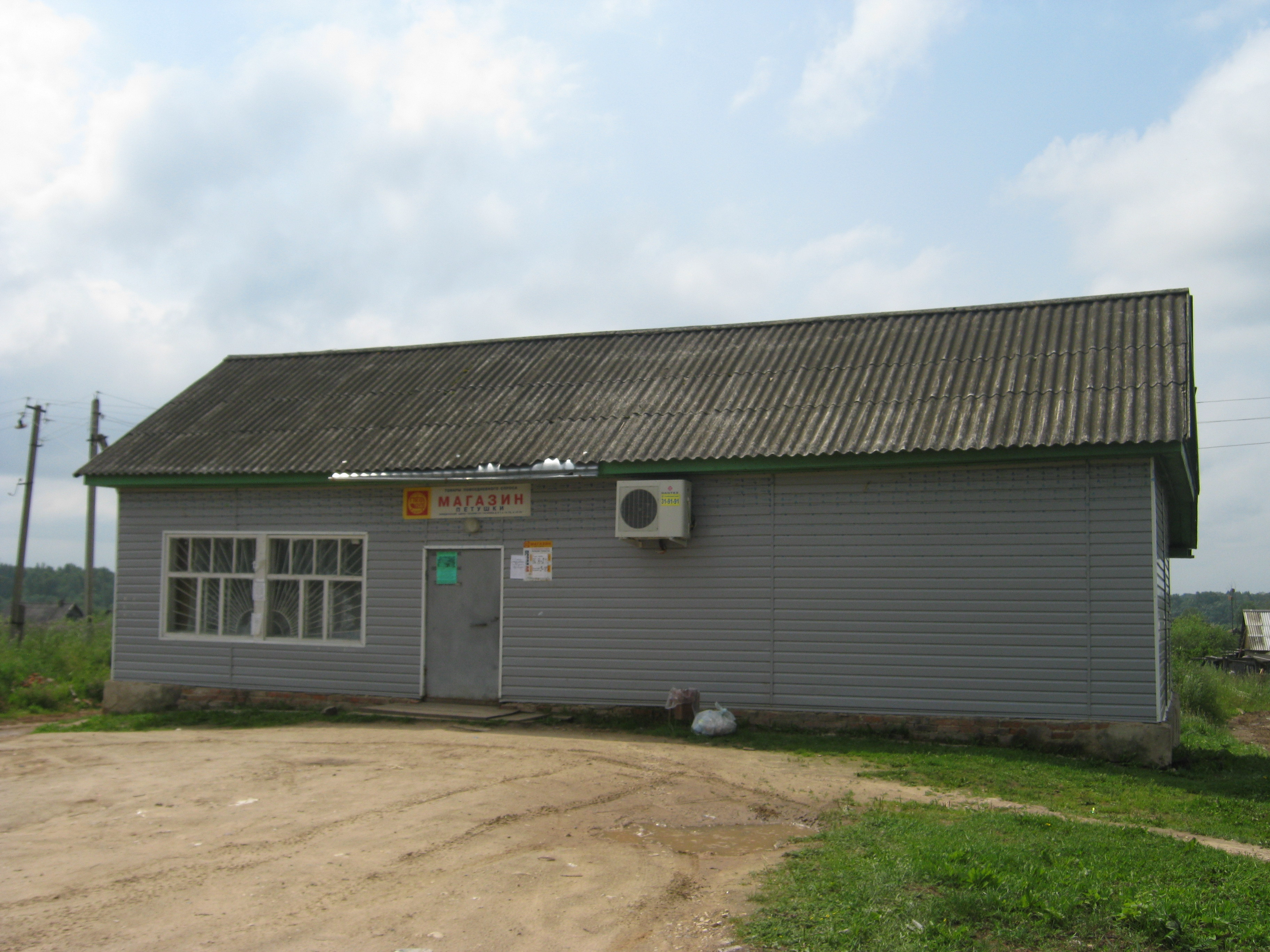 Магазин в деревне Петушки Гагаринского района Смоленской области